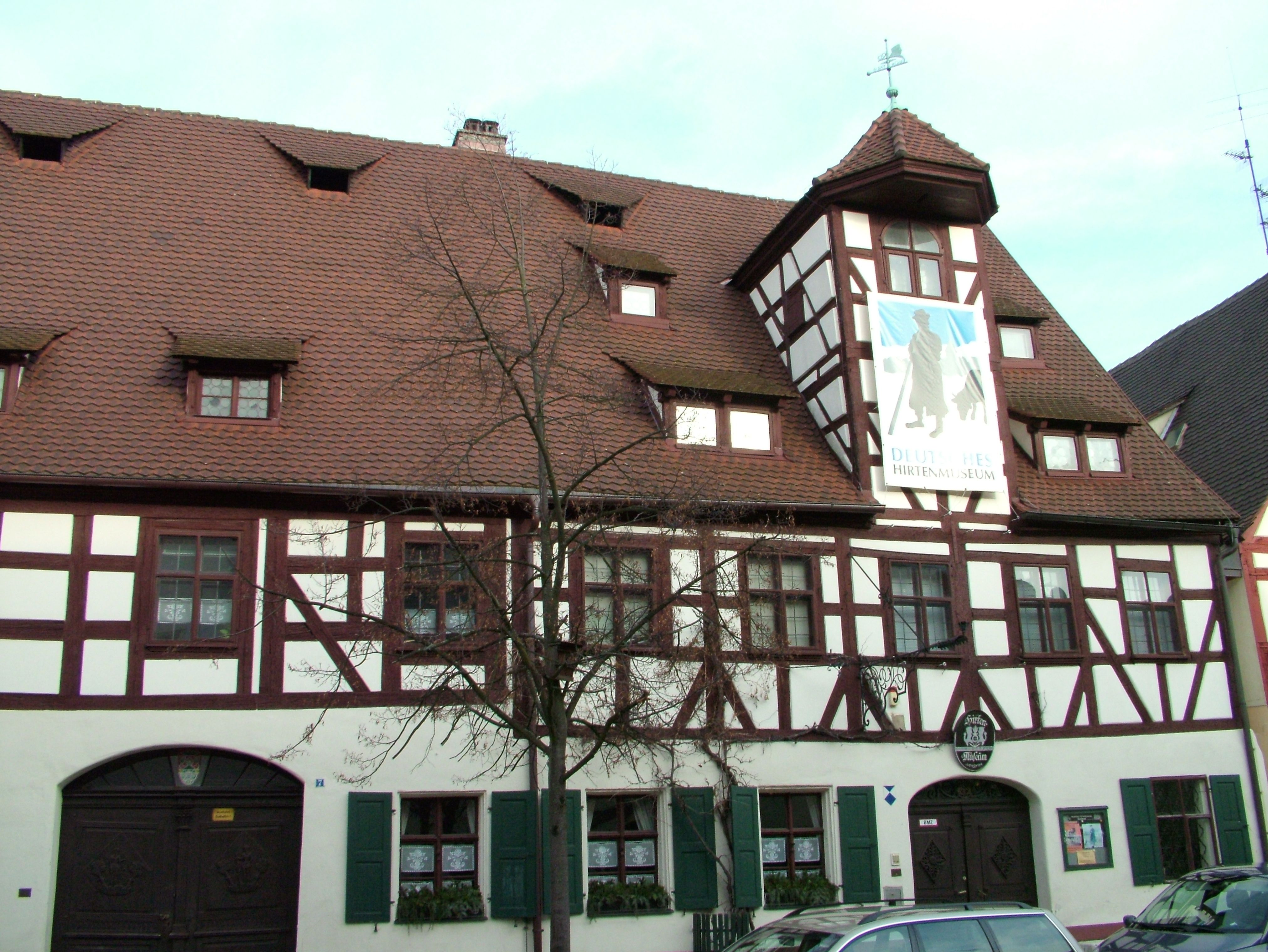 Hersbruck, Bayern, Deutschland, Das Hirtenmuseum